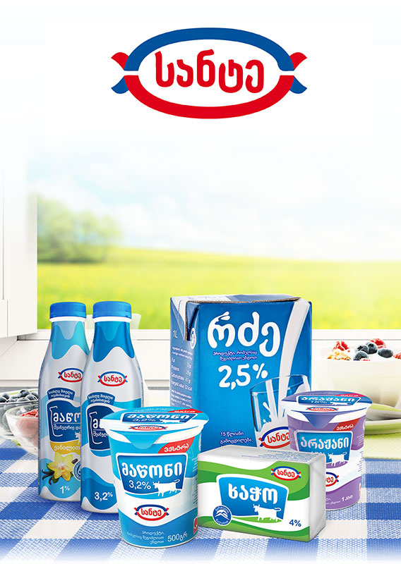 სანტინოს ლოგო